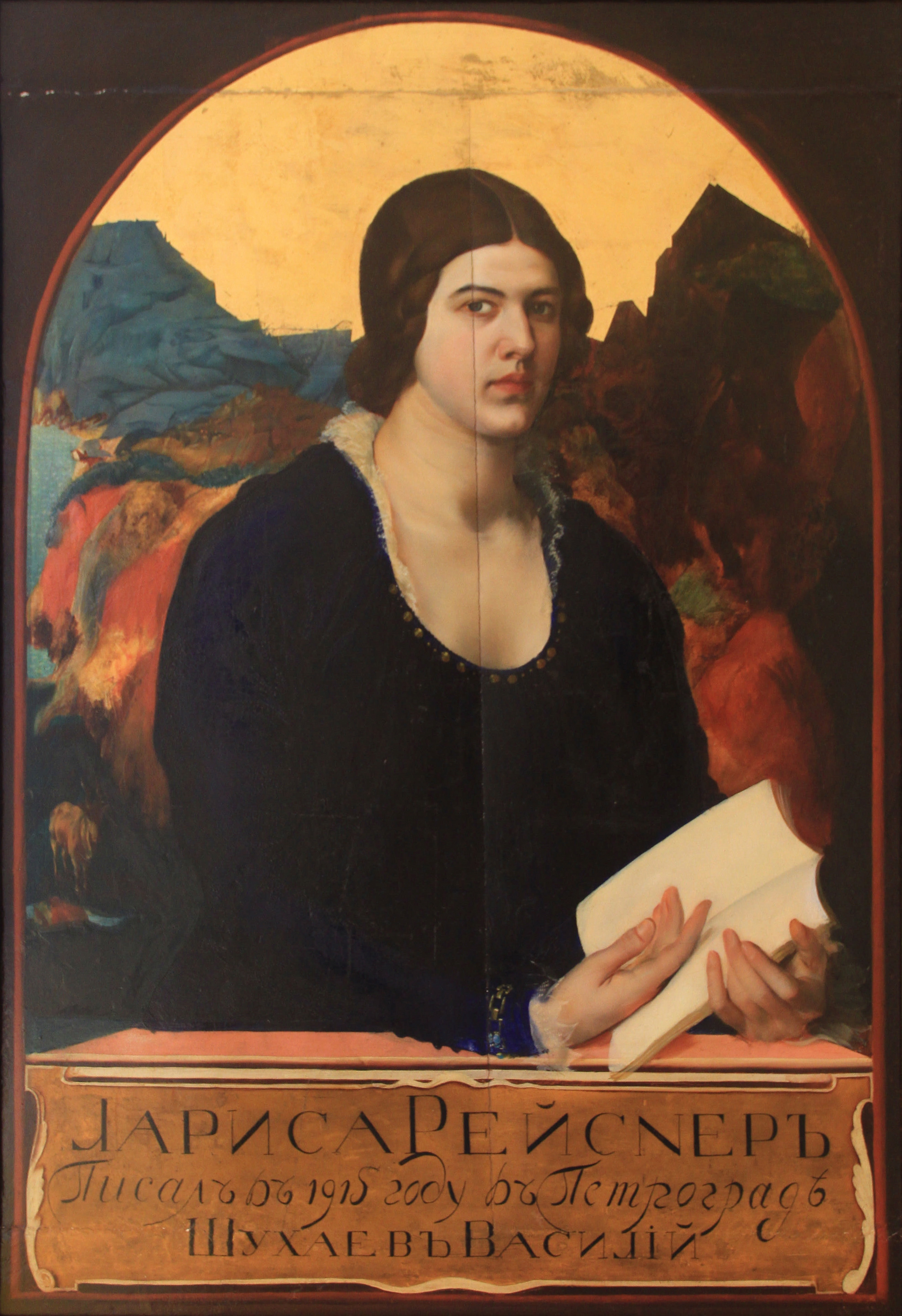 В. Шухаев. Портрет Ларисы Рейснер - красная роза революции. 1915 г. Музей Серебряного века в Доме В.Я.Брюсова